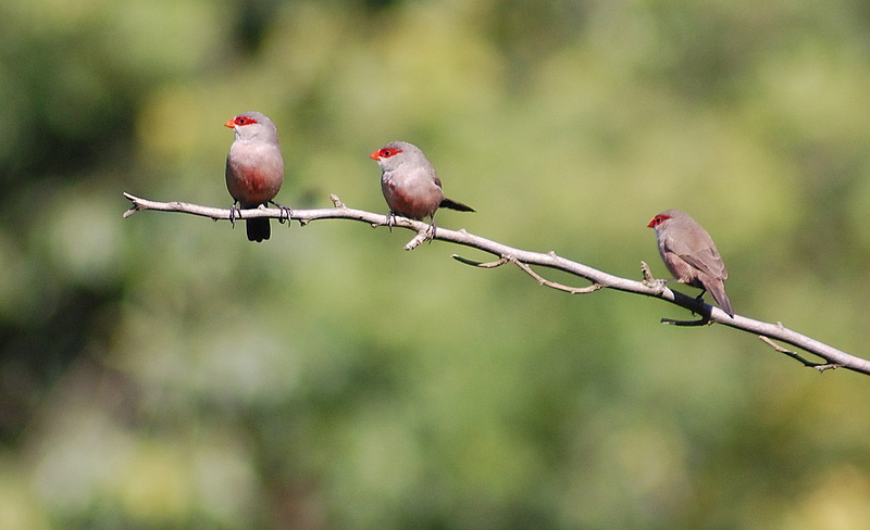 Jardim Botânico de São Paulo